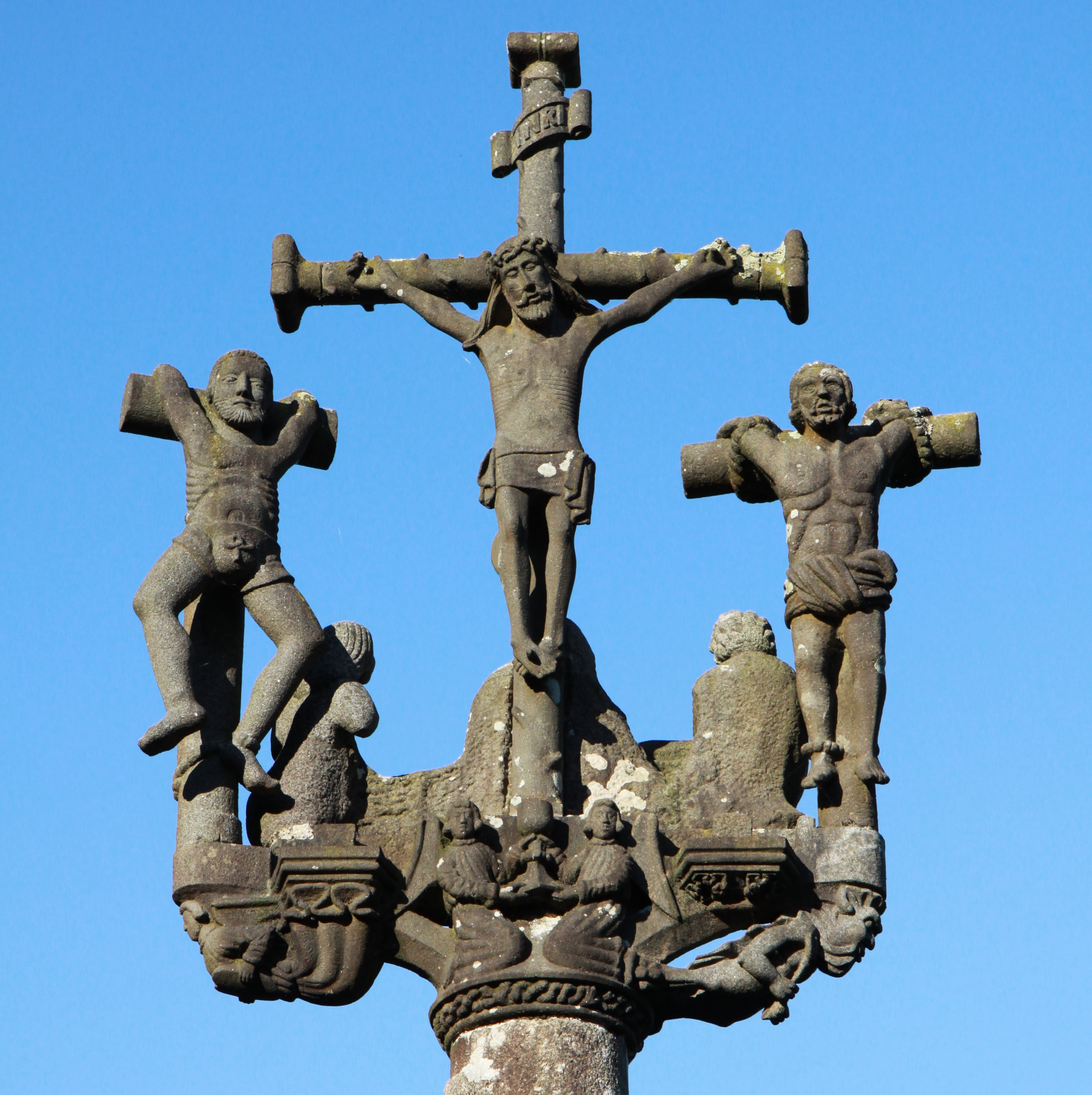 Détail du calvaire de l'enclos paroissial de Lampaul-Guimiliau, dans le Finistère (France).